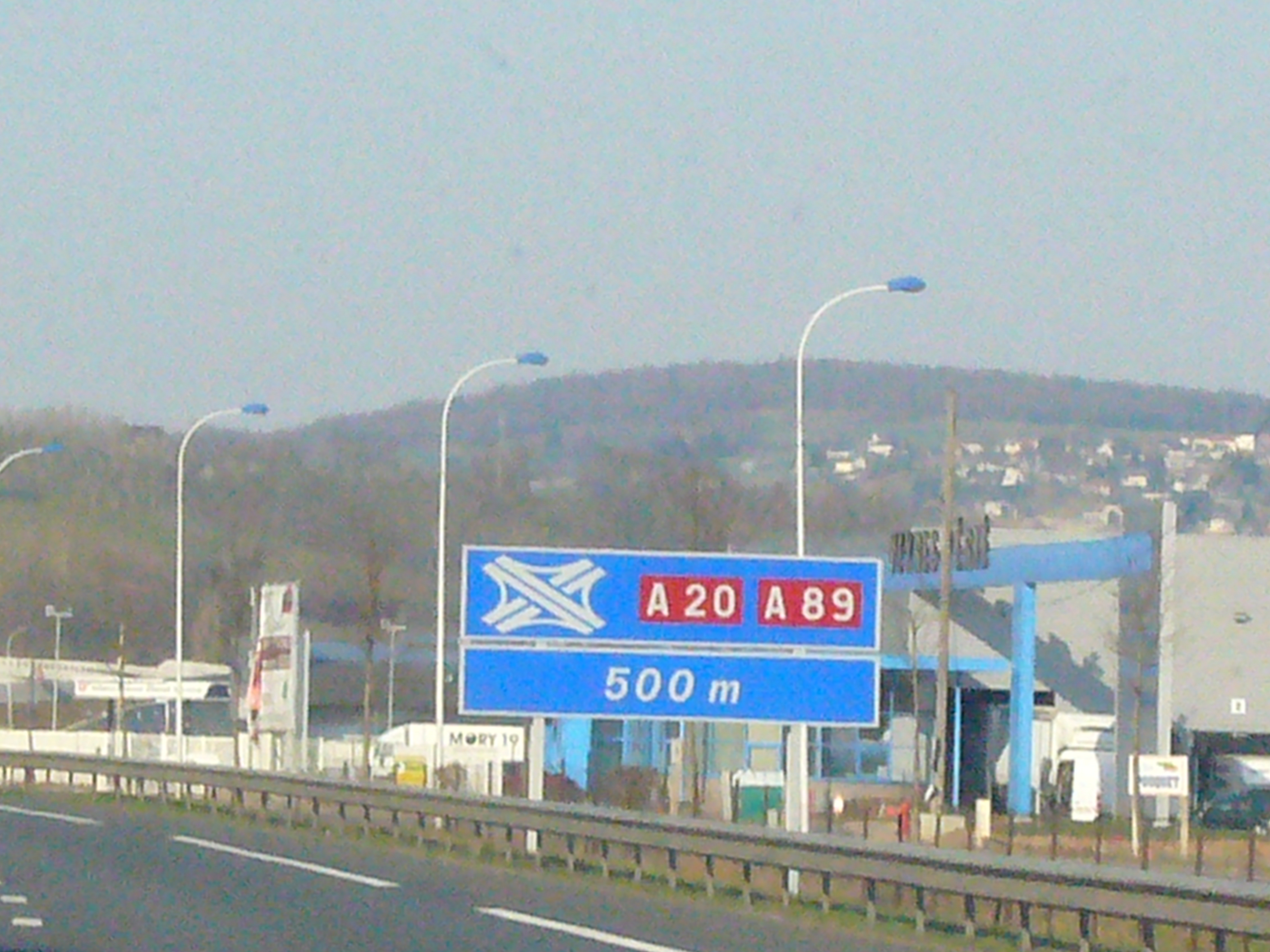 Intersection de l'A20 et de l'A89 annoncée par un panneau à Brive (Corrèze, France)